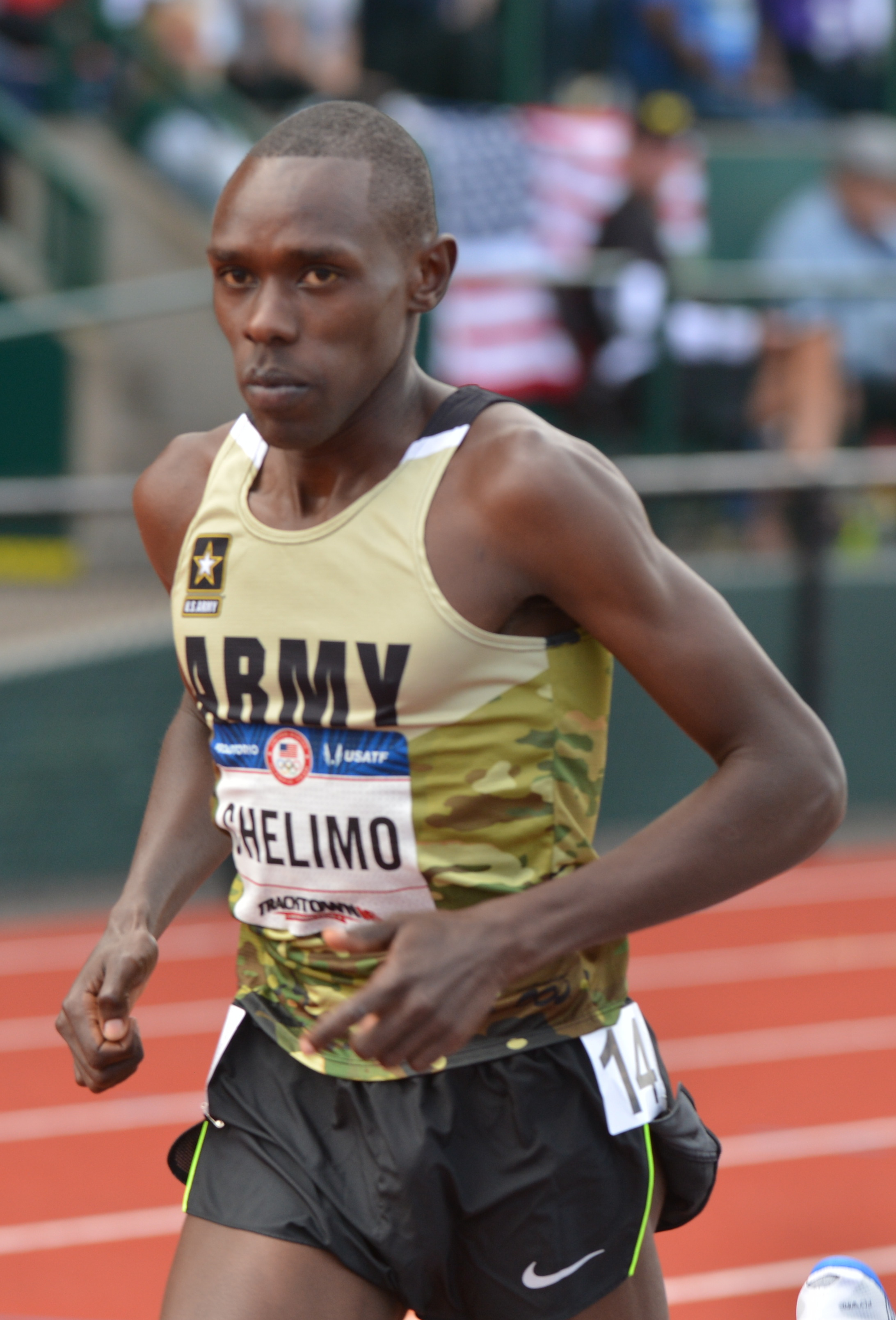 Paul Chelimo